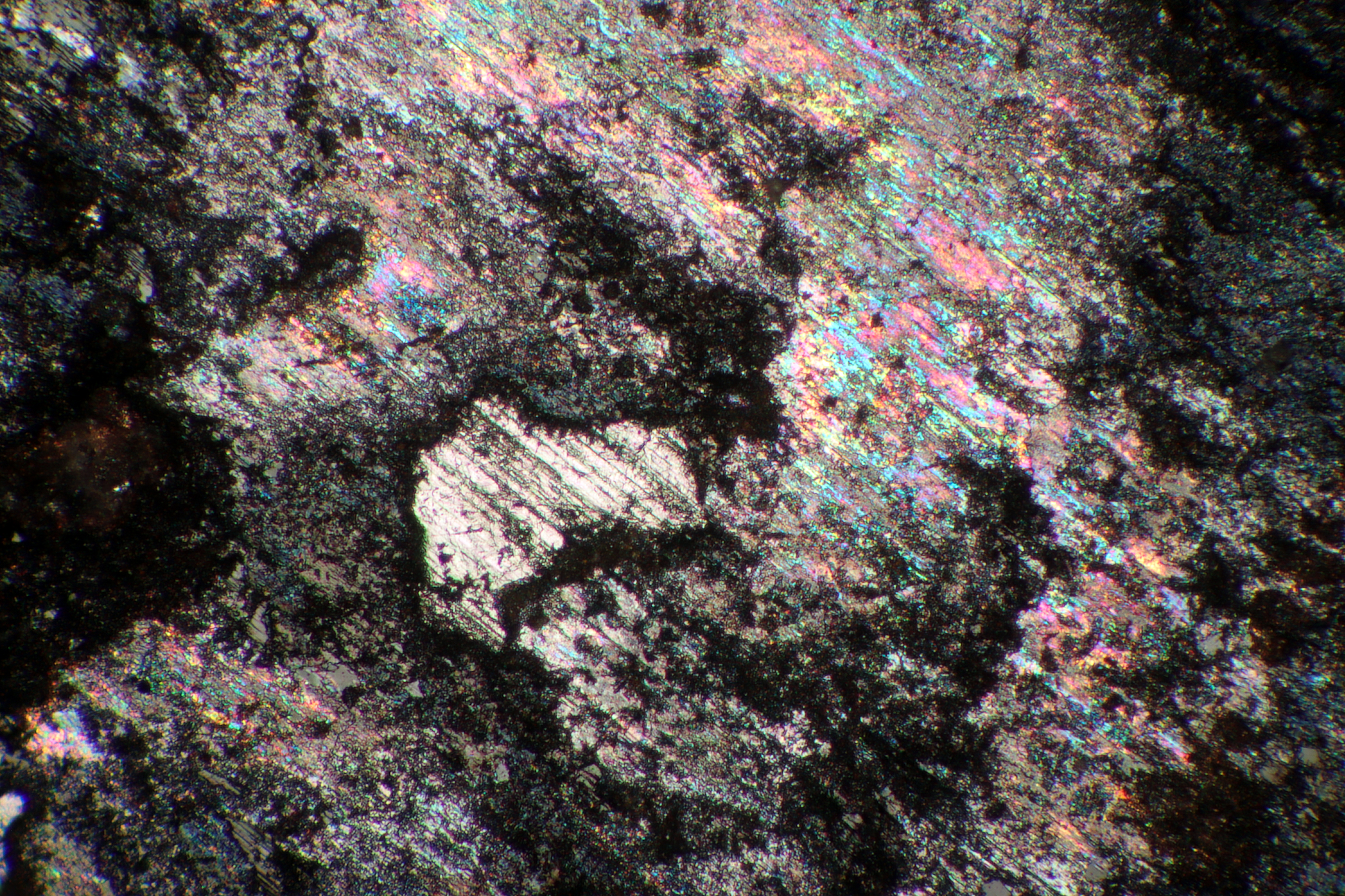 Bremsbelag (Pkw) mikroskopisch, aufgenommen mit dem 8er Epiplan im Auflicht